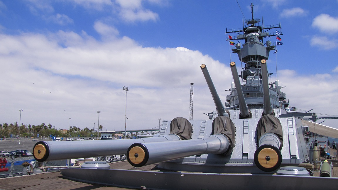 USS Iowa / BB-61 / ロサンゼルス港 / 2015年5月4日撮影